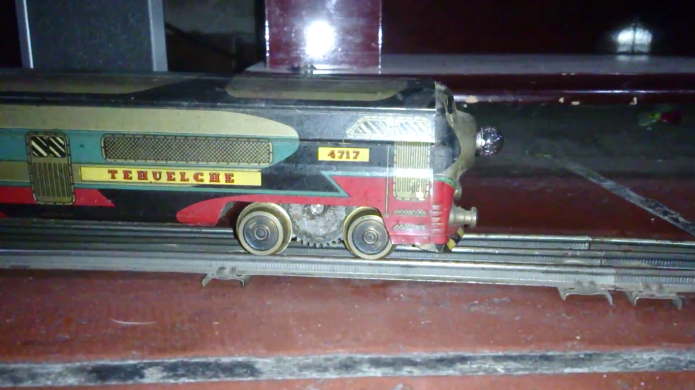 Engranaje del motor del Modelo 5-P